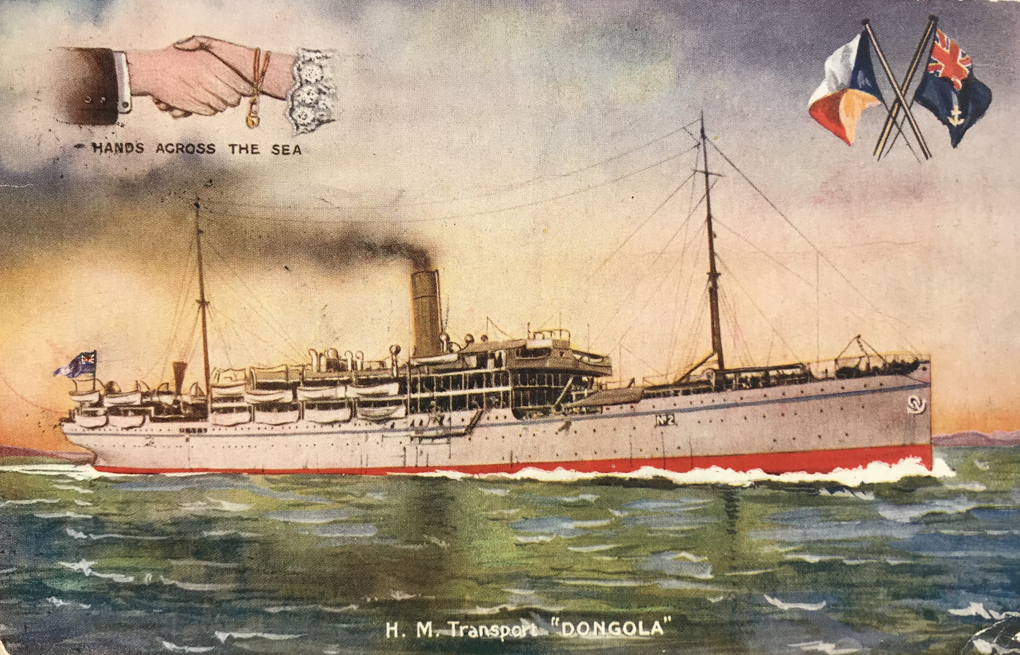 HMT Dongola